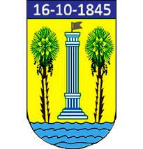 Brasão do município de Açu-RN